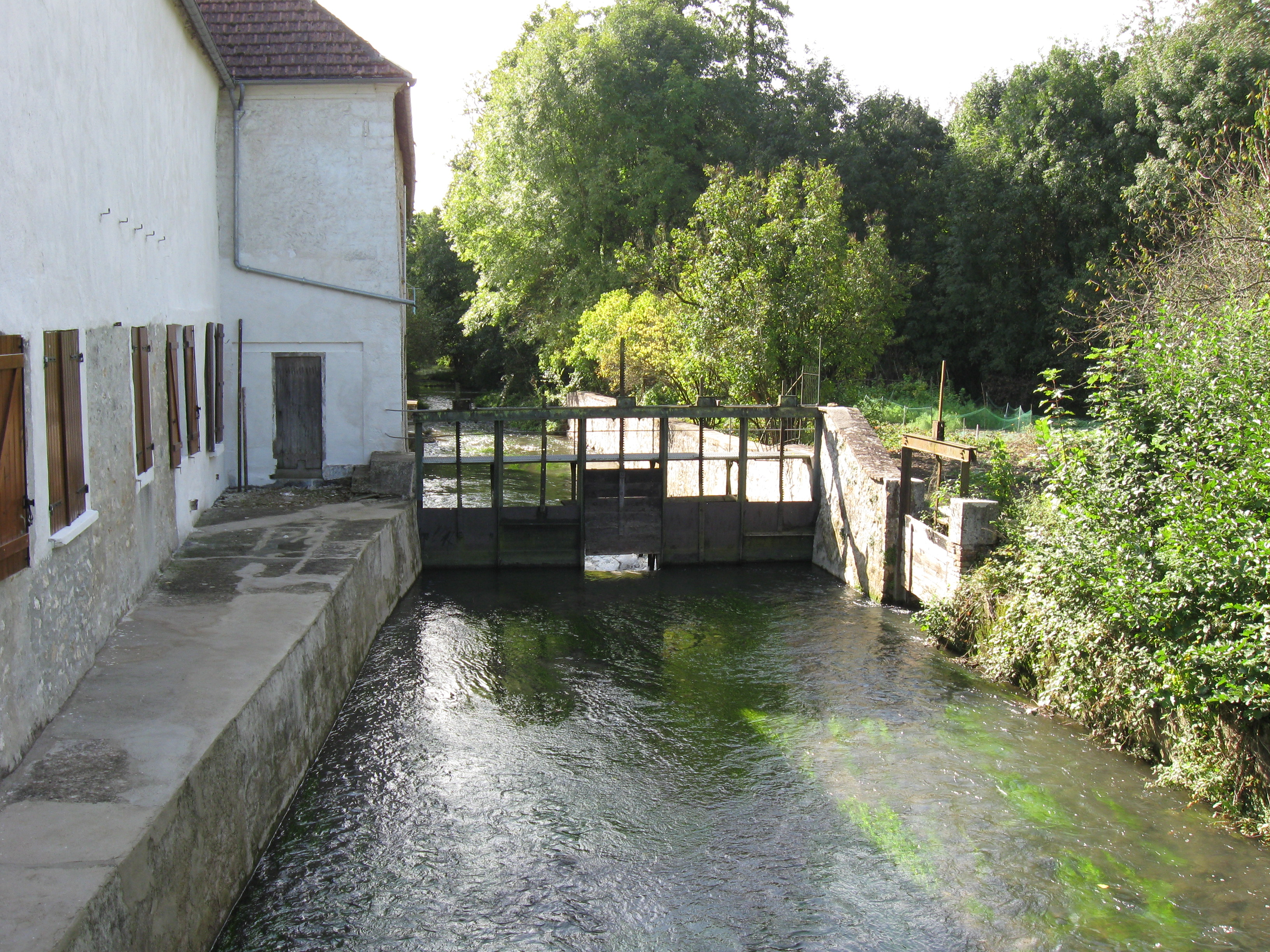 La Voulzie à Sainte-Colombe (département de la Seine et Marne, région Île-de-France).